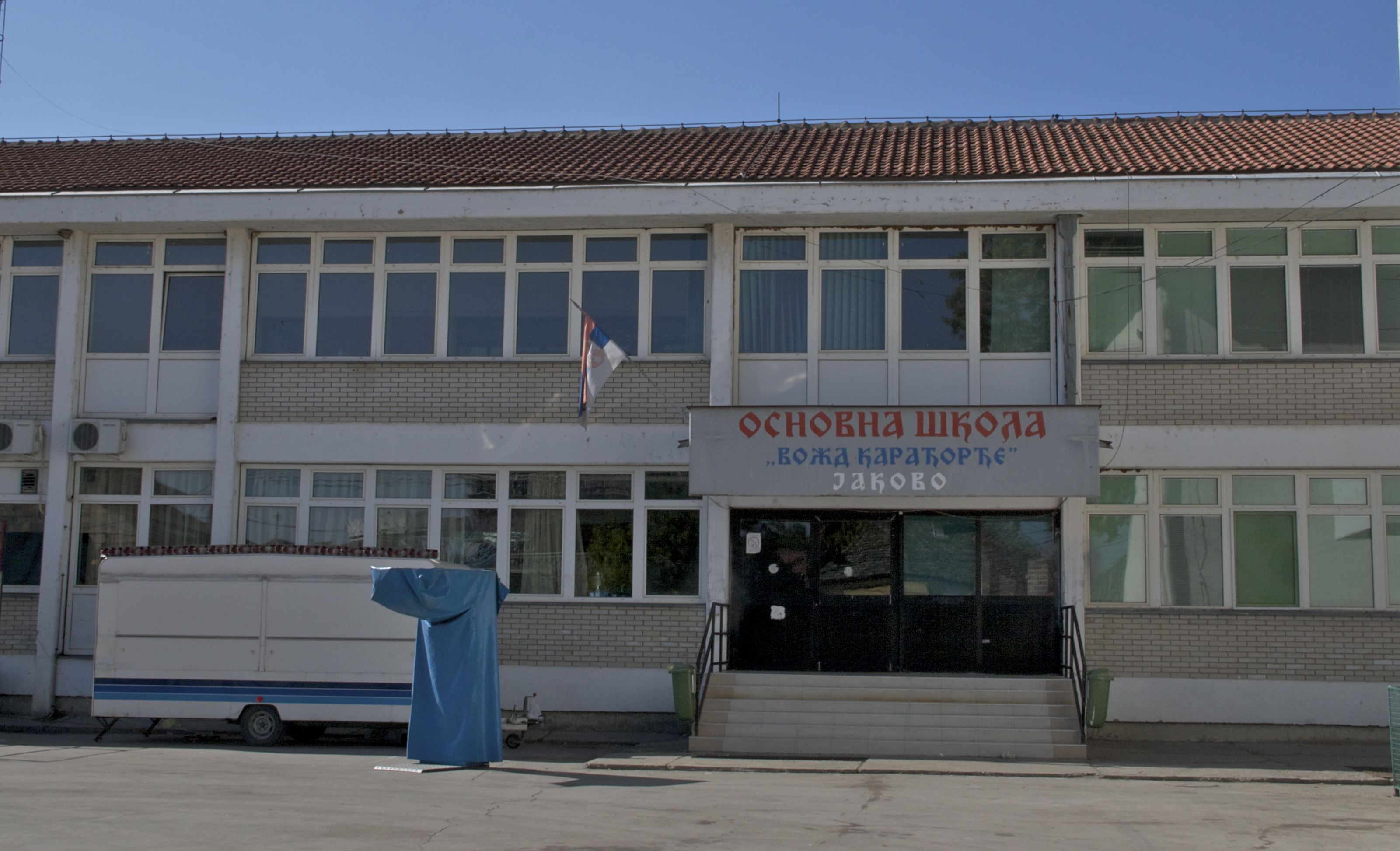 Основна школа "Вожд Карађорђе" у Јакову. Налази се у Бољевачкој улици 2. Основана је 1786. године, на војној граници аустроугарске империје. Назив је добила по Карађорђу, који је после Првог српског устанка нашао уточиште у манастиру Фенек. Стари део школске зграде је сазидан 1954. године, а нови део је дограђен 1991. године. У школи стиче знање око 570 ученика распоређених у 23 одељења. Број ученика сваке године има тенденцију раста. У саставу школе се налазе спортски терени за фудбал и кошарку, довољно слободних површина за проширење терена и летњу учионицу, уређен парк. Школа се финансита из буџета Републике Србије, донације Фонда сестара Крстоношић, Града Београда, Општине Сурчин и мањим донацијама родитеља.